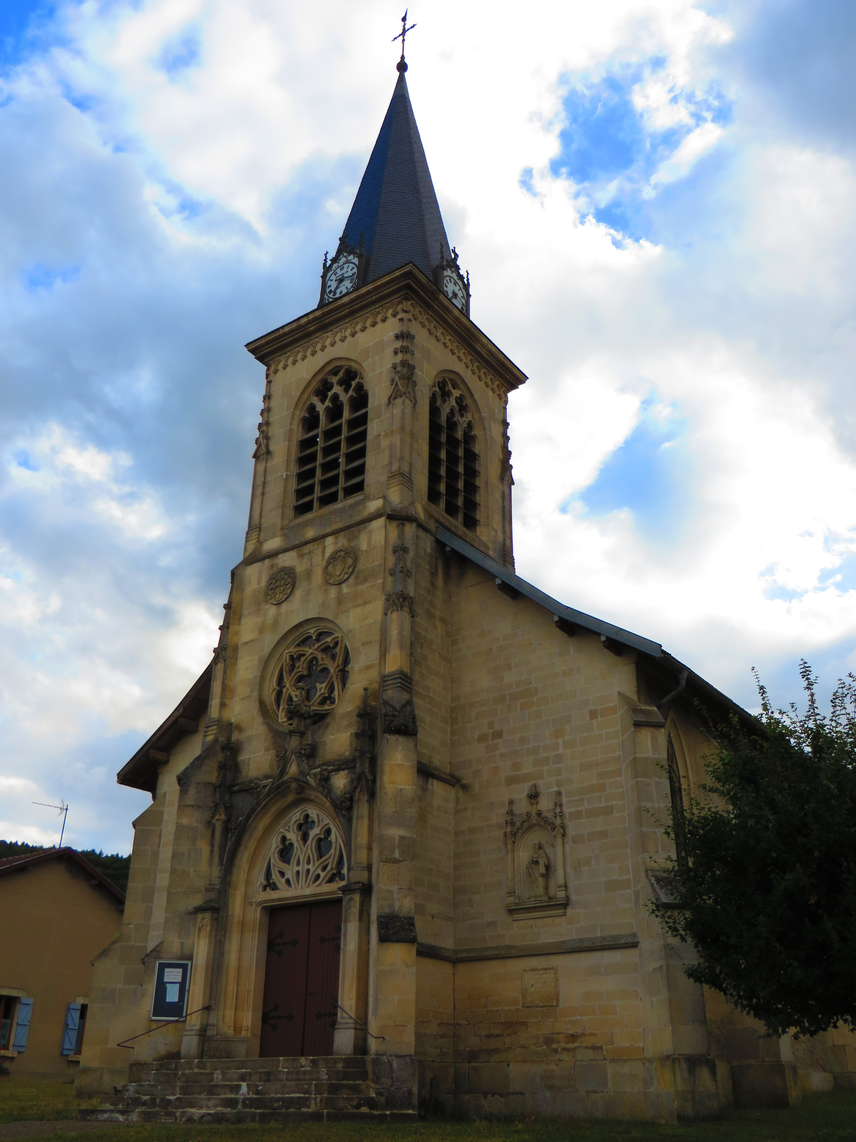 Herbeuville L'église Saint-Vanne